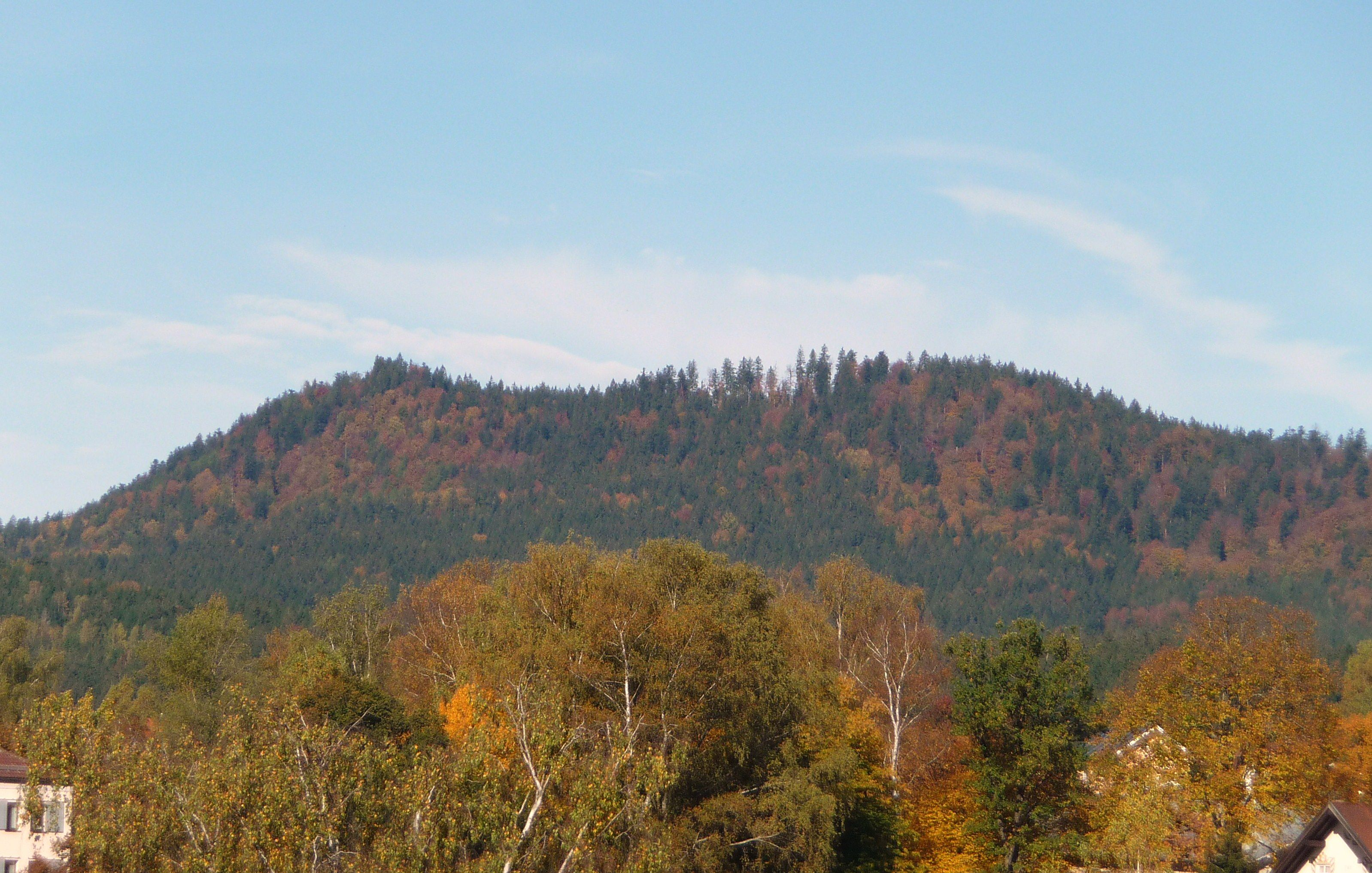 Blick von Zwiesel zum Hennenkobel (967,6 m)